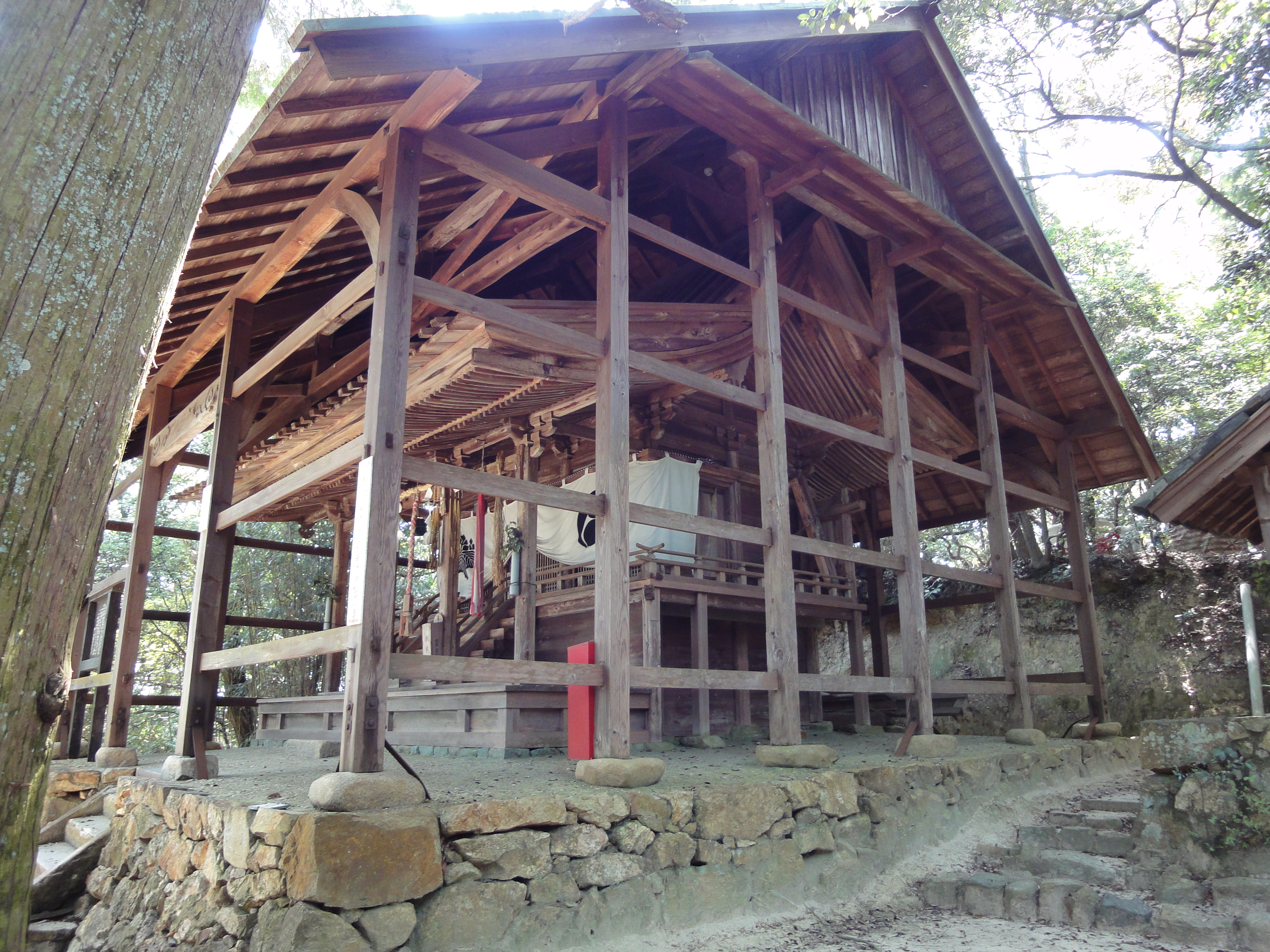 若王山無動寺若王子神社